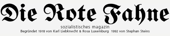 Schriftzug/Logo der Zeitung “Die Rote Fahne" (The Red Flag), erstellt 1918, digital überarbeitet 1992